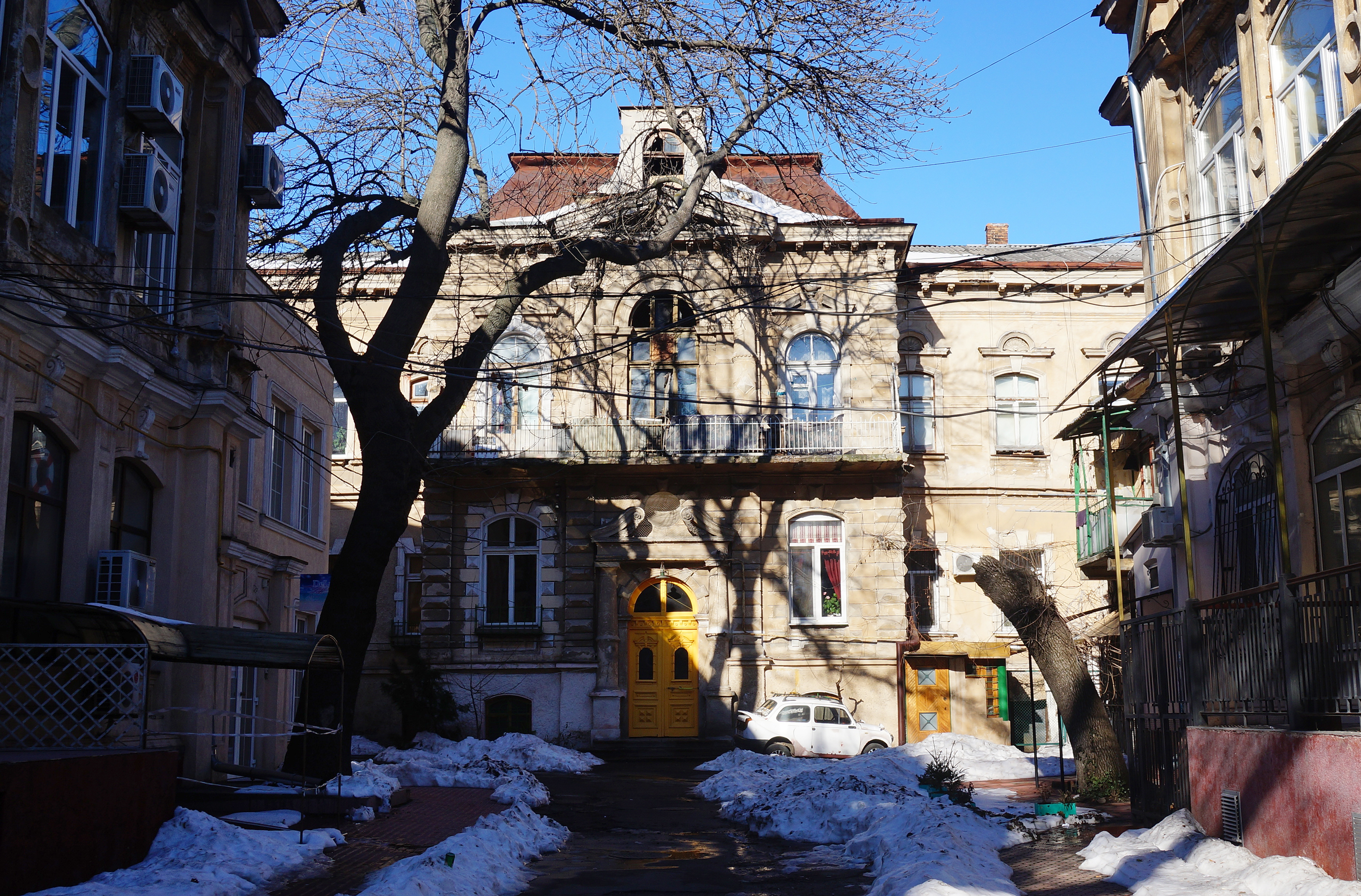 Комплекс житлових будинків Параскєви. Будинок житловий, Одеса, вул. Жуковського, 32